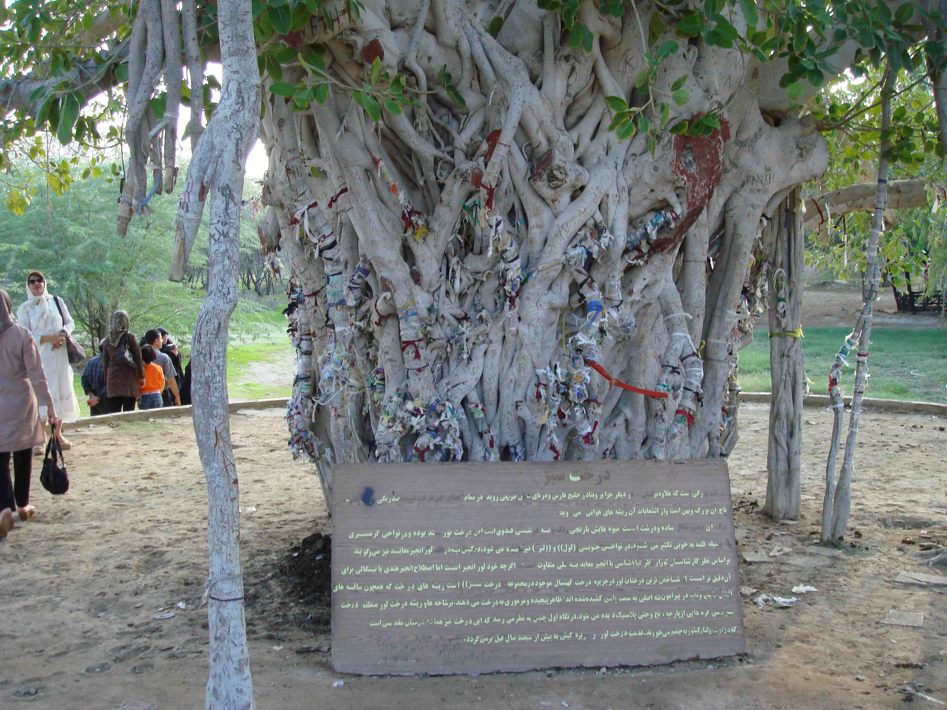 درخت انجیر معابد در جزیره کیش. اینجانب ایجاد کننده این تصویر می باشم. استفاده از این تصویر آزاد می باشد.